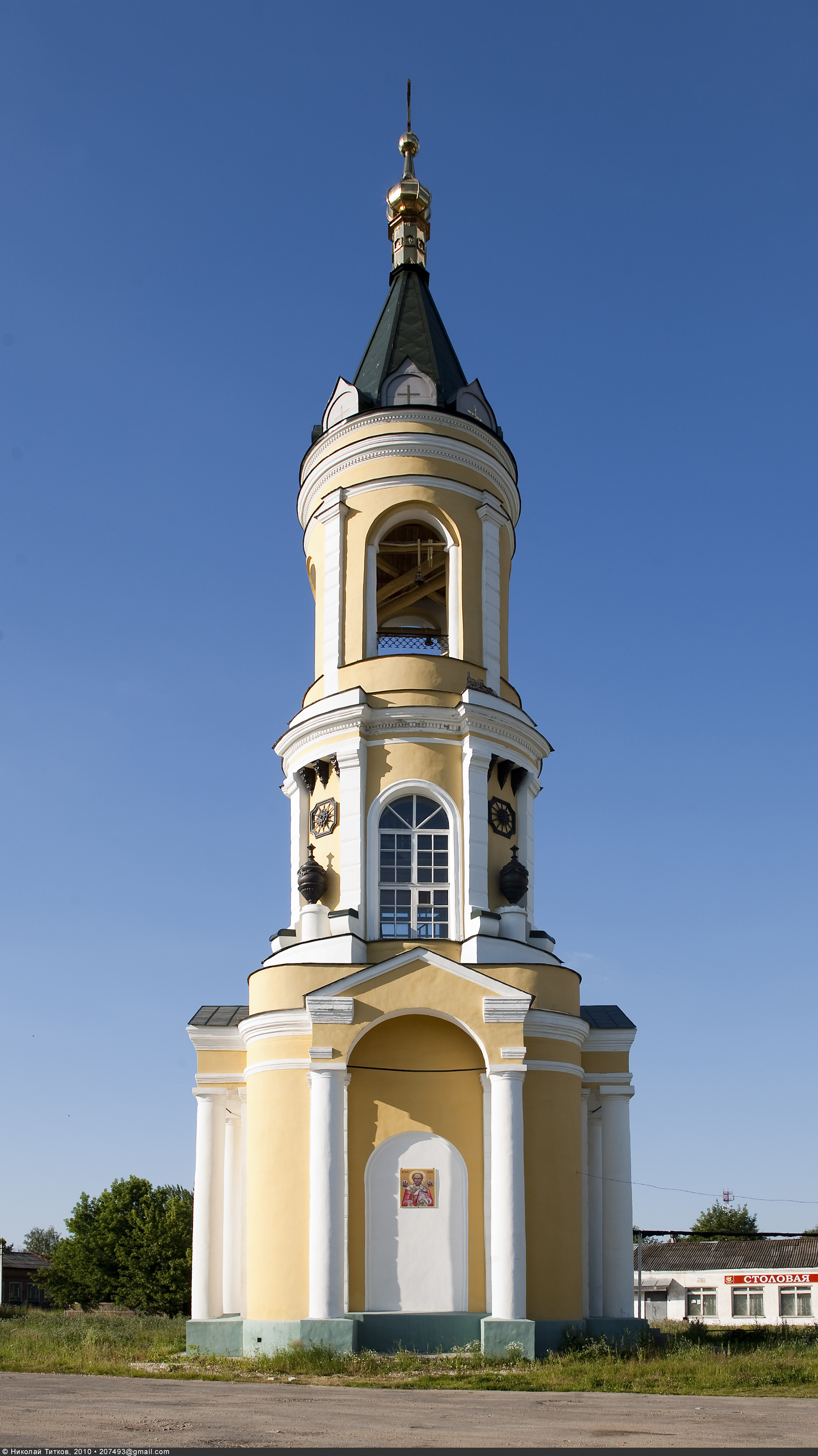 Церковь Николая Чудотворца в селе Чéркутино Собинского района Владимирской области. Колокольня при Рождественской (Богородице-Рождественской) церкви в селе Черкутино построена на средства Николая Ивановича Салтыкова в 1802 году. В настоящее время является церковью Николая Чудотворца.